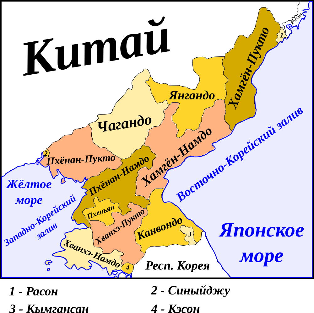 Административное деление Северной Кореи